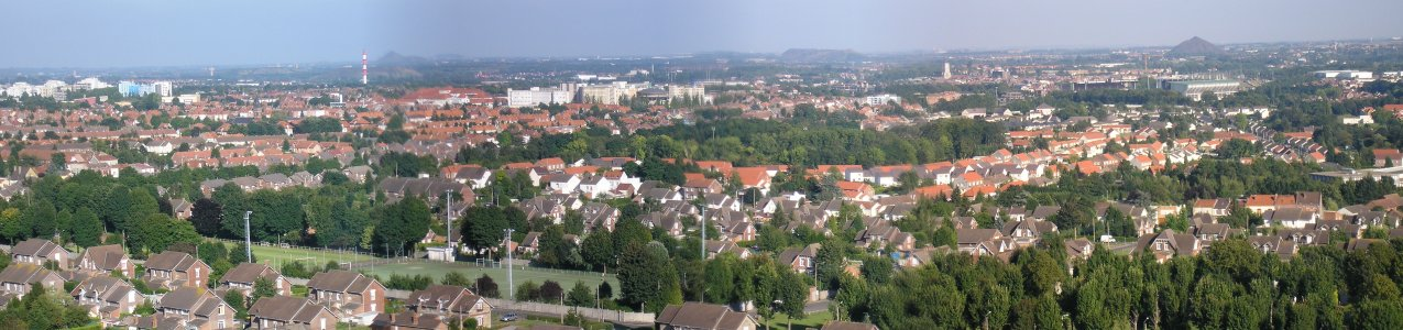 Vue panoramique de Lens, Pas-de-Calais prise par moi-même le 9 août 2005 depuis le site Écopôle 11/19 à Loos-en-Gohelle. Hemmer 17:29, 1 October 2005 (UTC)